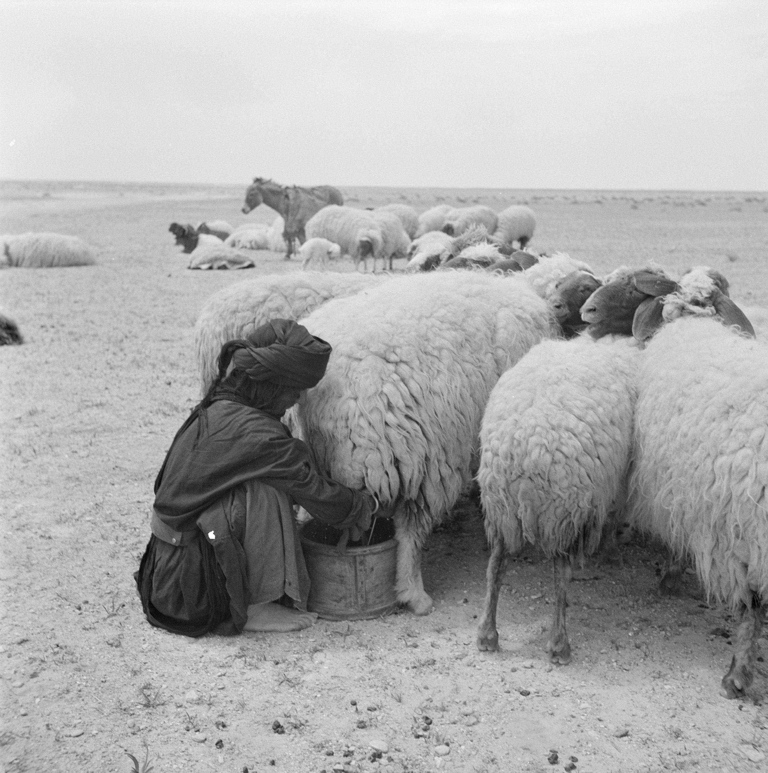 Collectie / Archief : Fotocollectie Van de Poll Reportage / Serie : Midden-Oosten 1950-1955: Syrië Beschrijving : Bedoeïnen met hun schapen Datum : 1950 Locatie : Syrië Trefwoorden : bedoeinen, melken, schapen, woestijnen Fotograaf : Poll, Willem van de Auteursrechthebbende : Nationaal Archief Materiaalsoort : Negatief (zwart/wit) Nummer archiefinventaris : bekijk toegang 2.24.14.02 Bestanddeelnummer : 255-6071